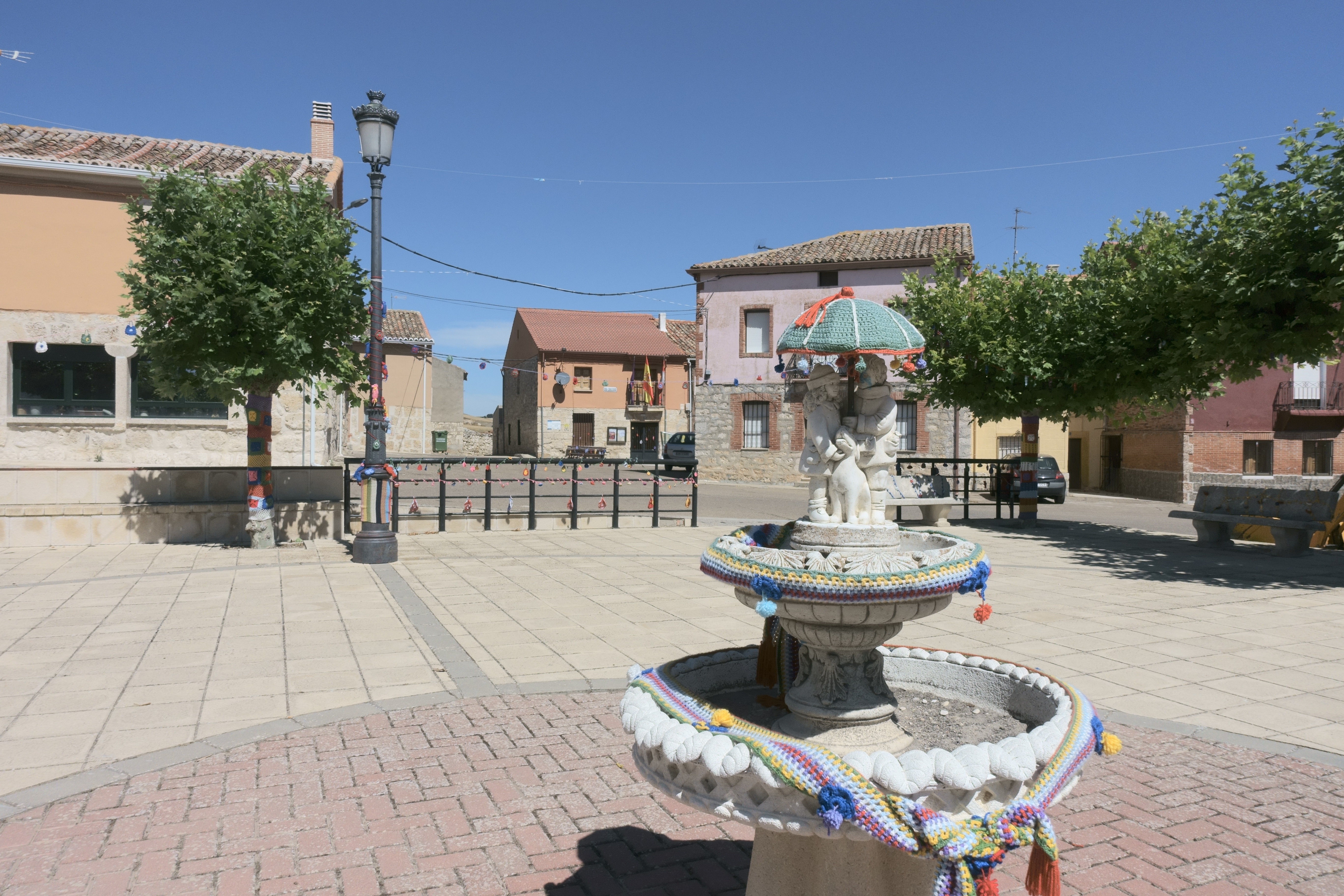 Plaza de España, en Tabanera de Cerrato (Palencia, España).